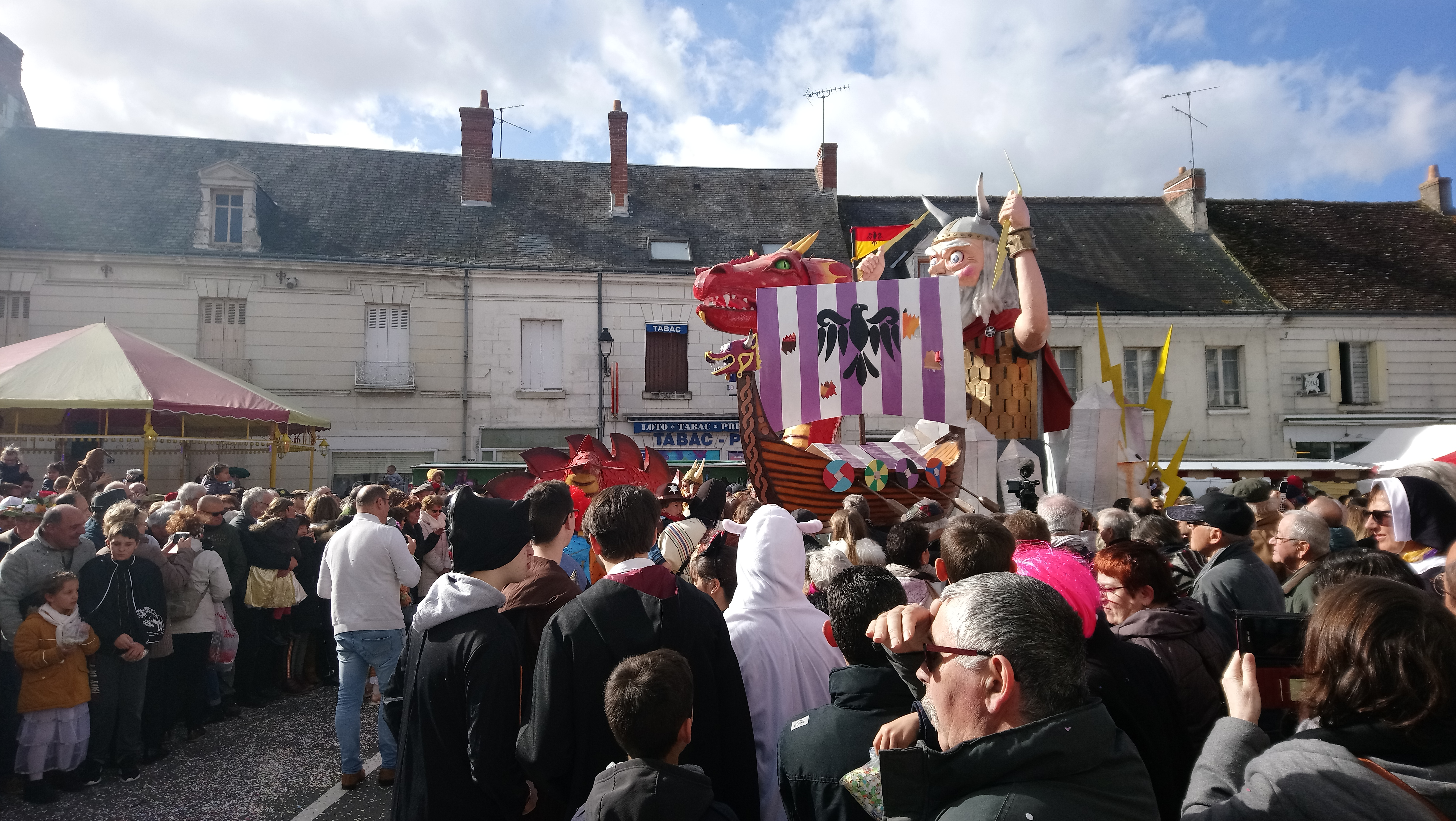 Carnaval de Manthelan (37)